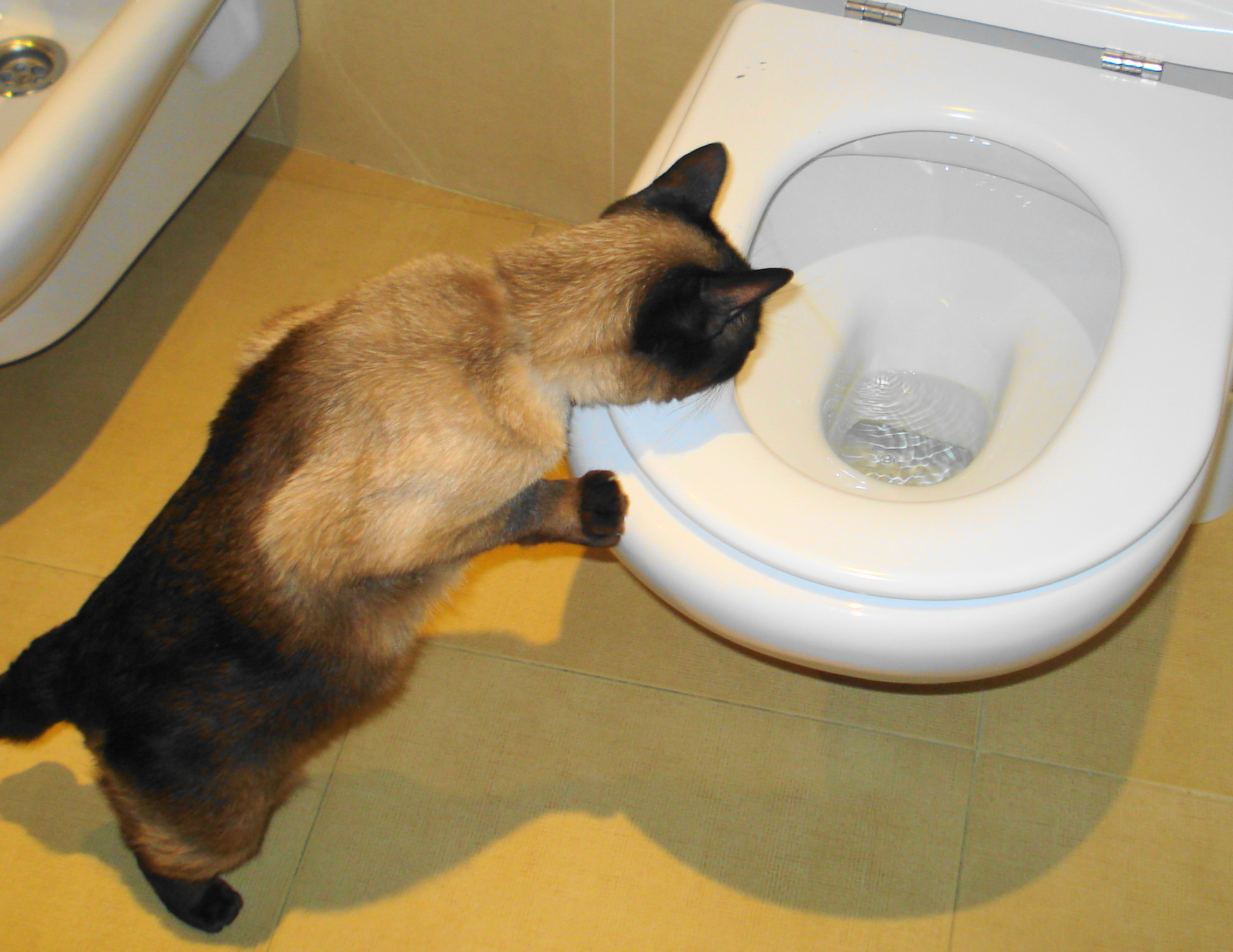 Gata siamesa curiosa.